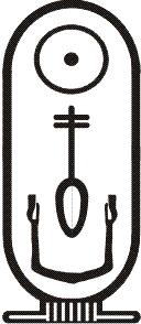 Kartuschenname "Neferkare" in der Sakkara-Liste